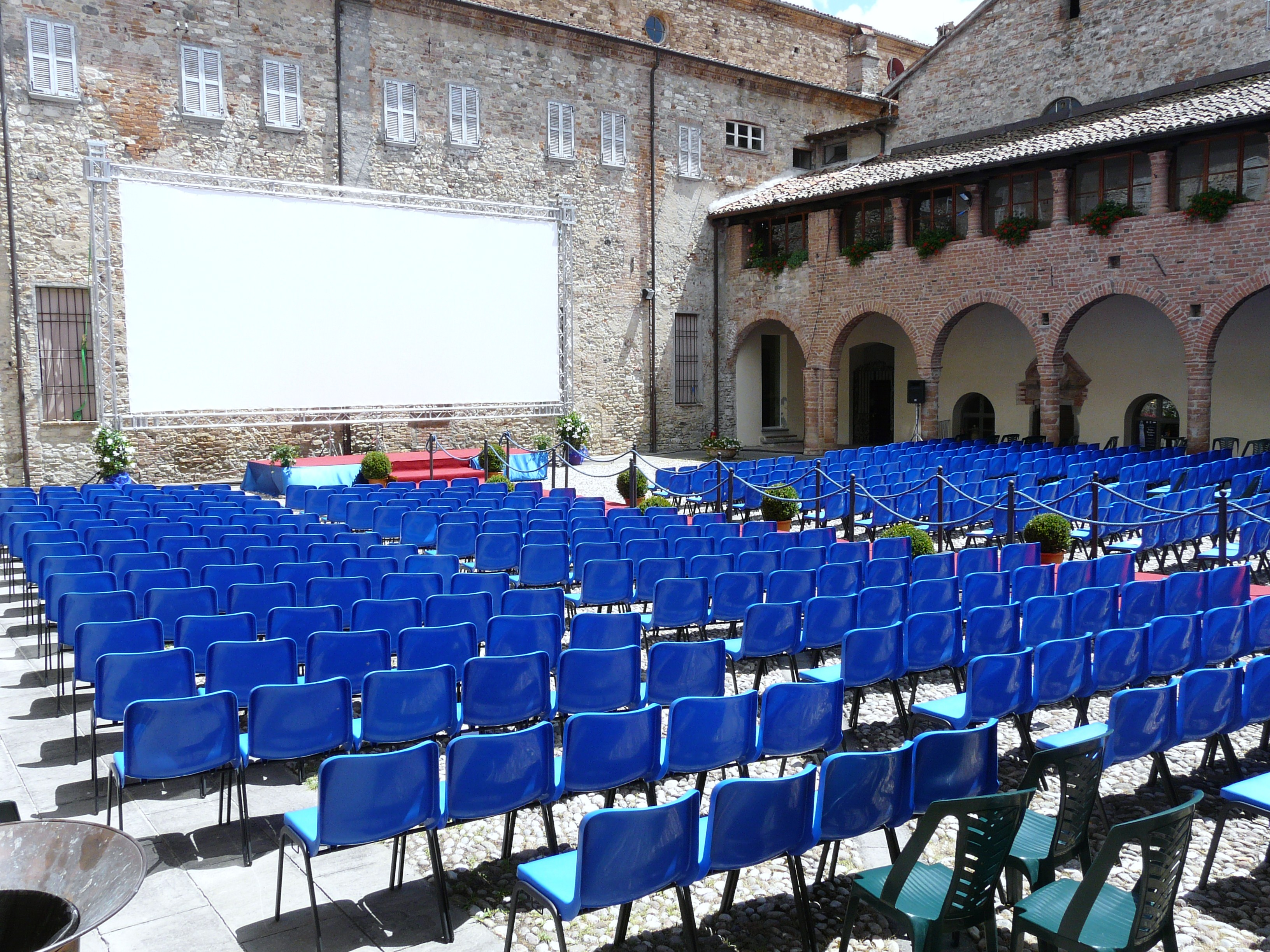 Immagini dell'abbazia di San Colombano di Bobbio, Emilia-Romagna, Italia